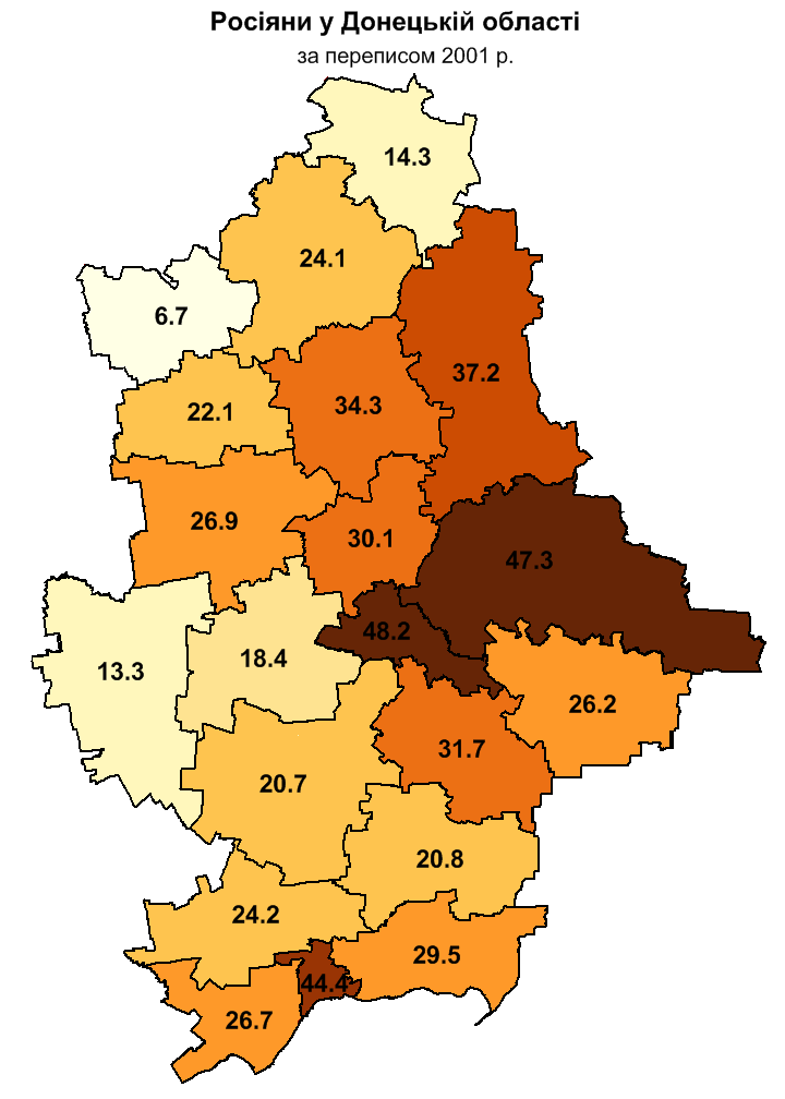 Розселення росіян у районах (разом з містами) Донецької області за переписом 2001 р. / Russians in Donetsk Oblast, 2001 census